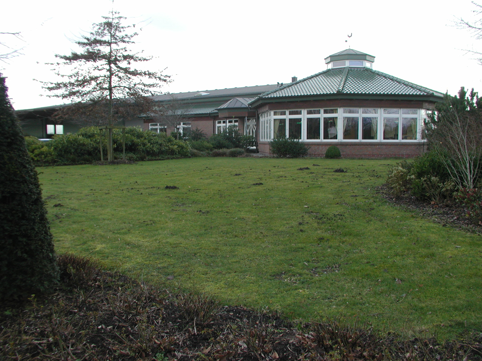 Rellingen, Egenbüttel, Pinneberger Straße, Baumschule